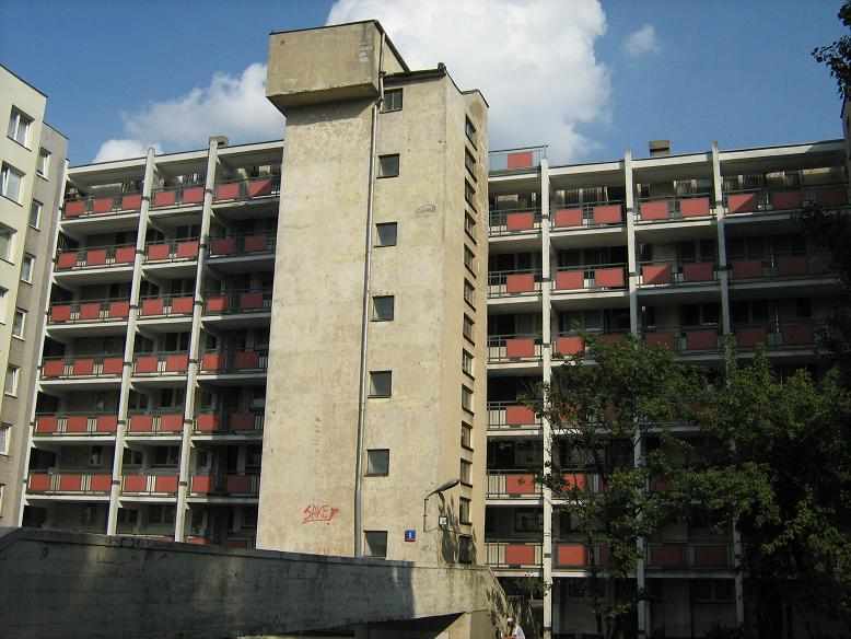 Przyczółek Grochowski Housing estate in Warsaw (Poland) Osiedle Przyczółek Grochowski w Warszawie. Blok Nowików z serialu "Bulionerzy".